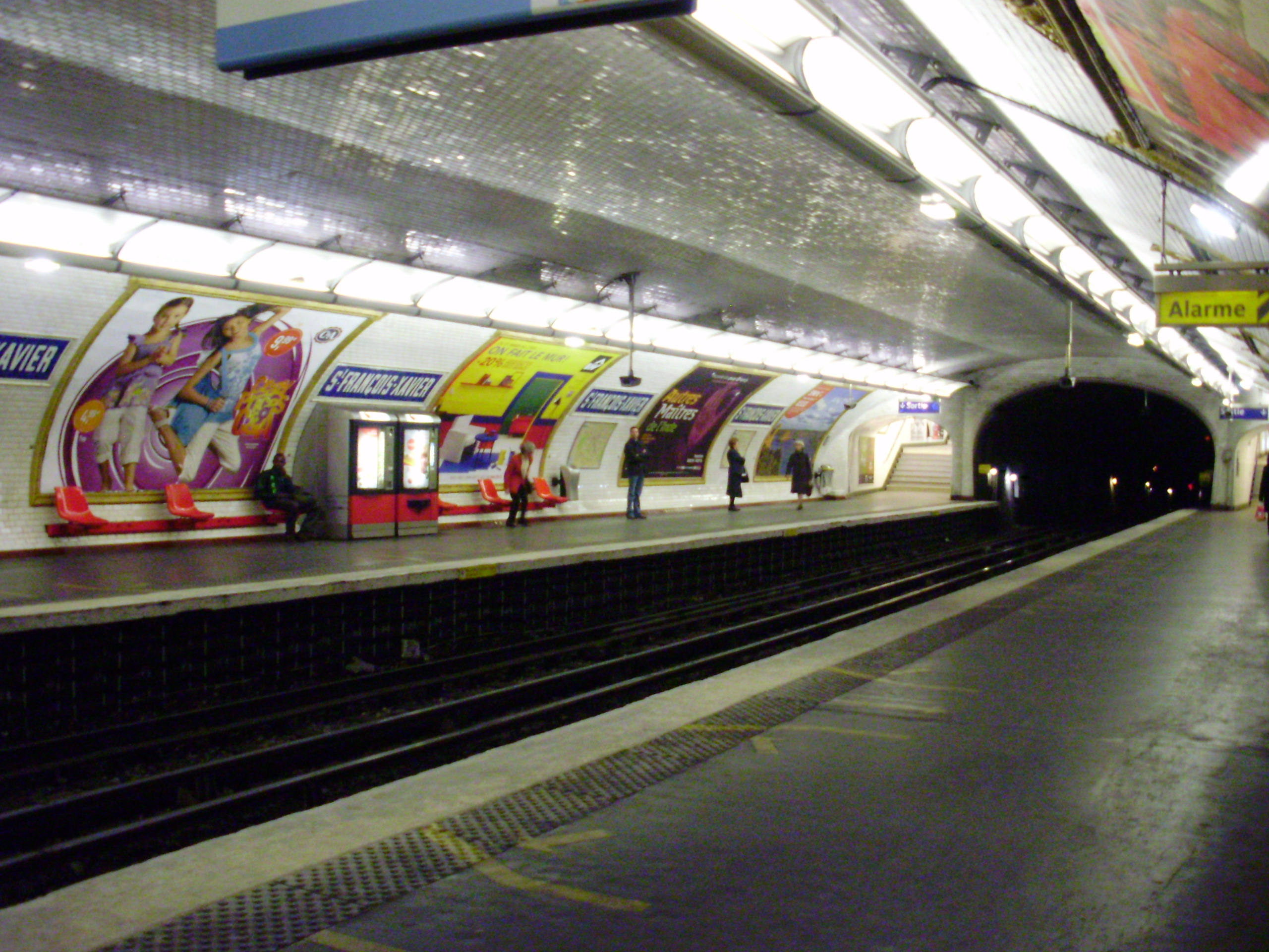 Quai de la station Saint-François-Xavier du métro de Paris